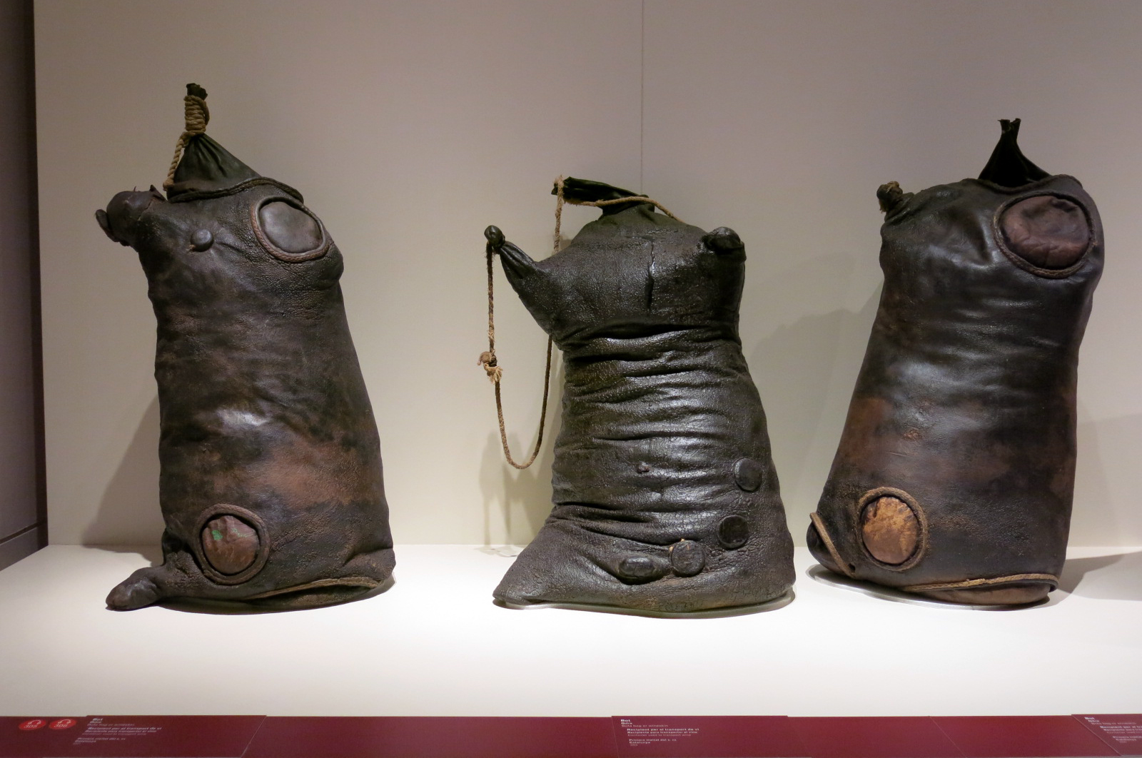 Palau Reial de Vilafranca del Penedès. Acull el museu VINSEUM, Museu de les Cultures del Vi de Catalunya)